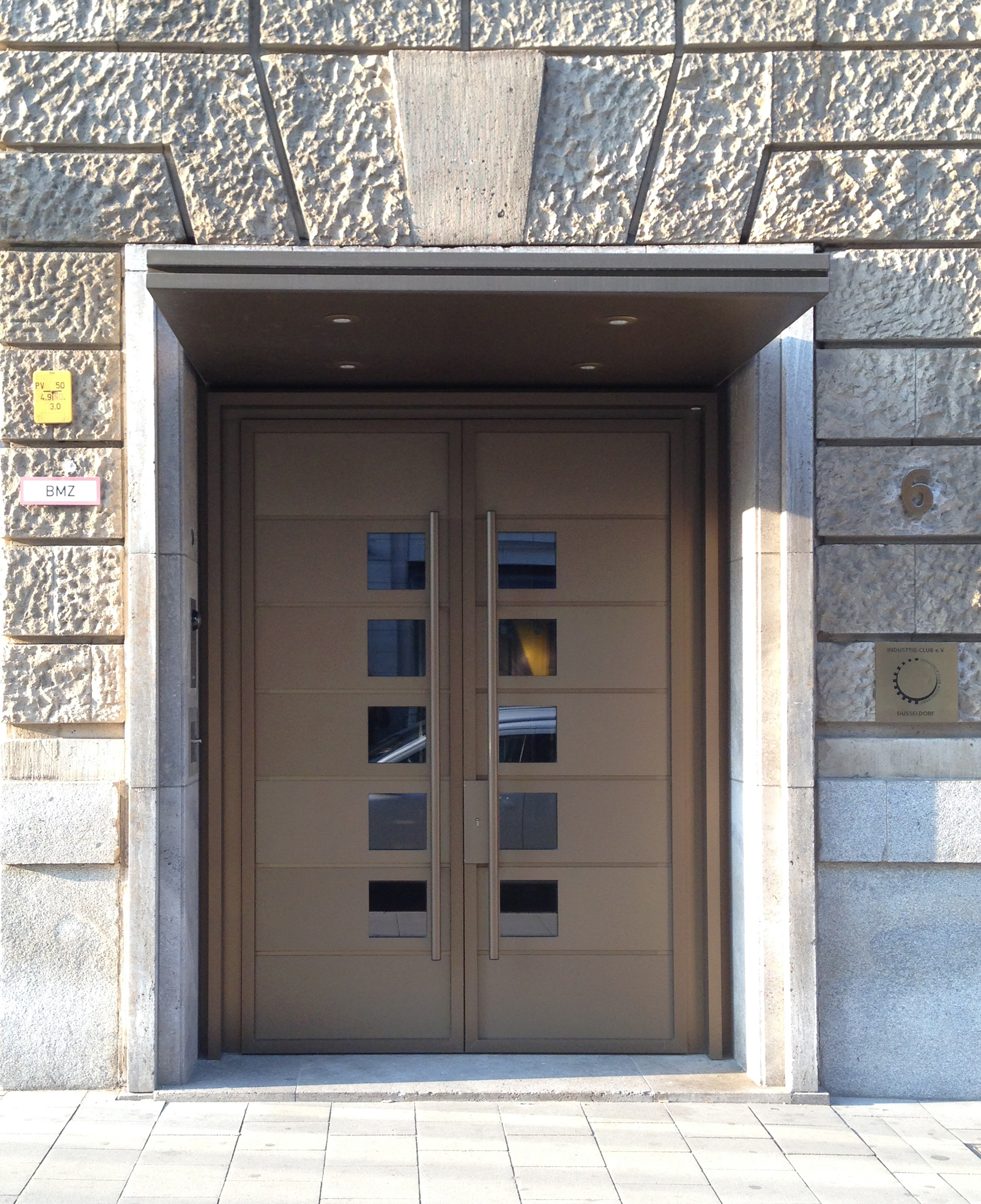 Eingang Industrieclub Elberfelder Straße 6 im Gebäude des Steigenberger Park-Hotel